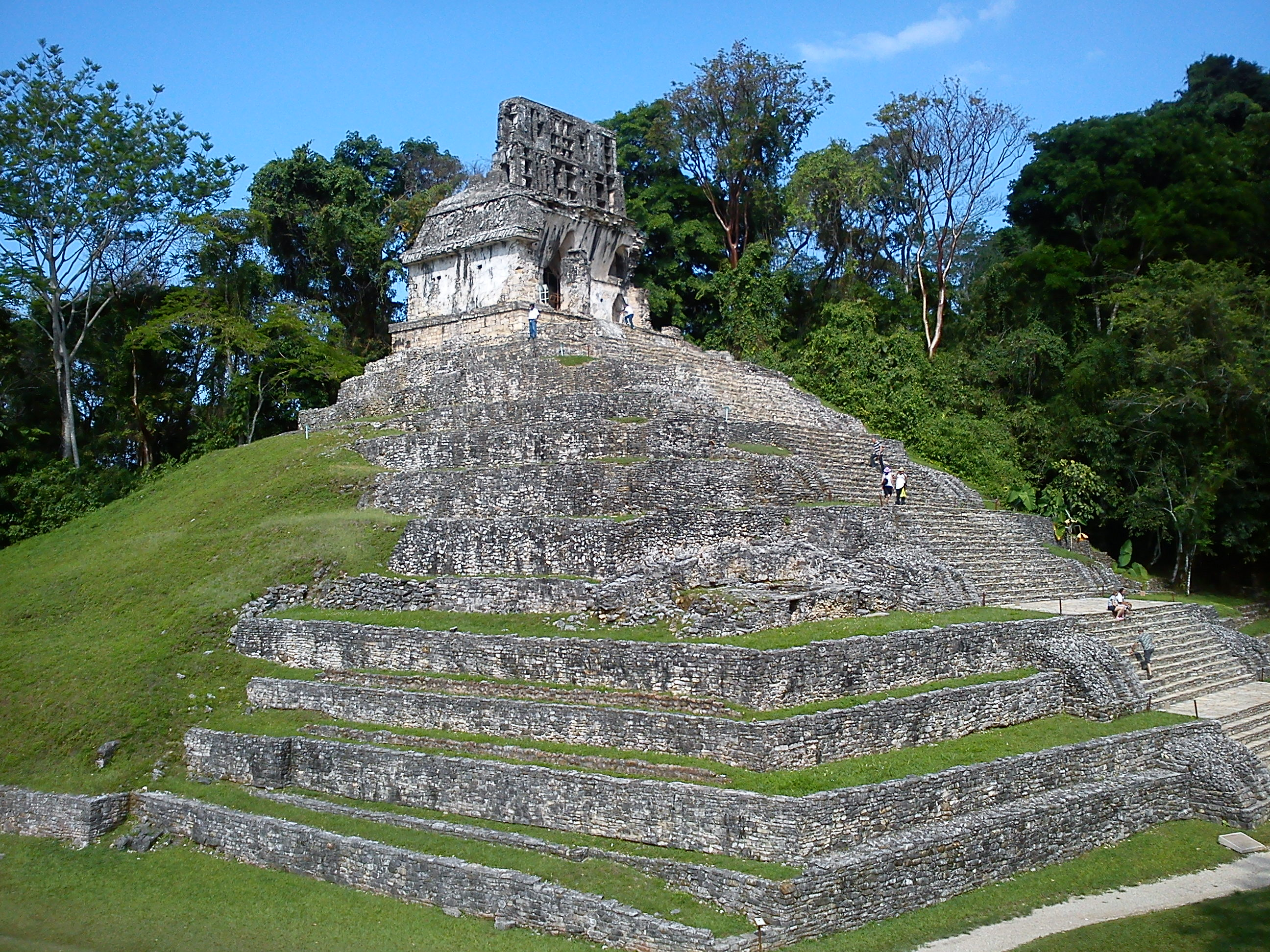 Pirámide del Templo de la Cruz